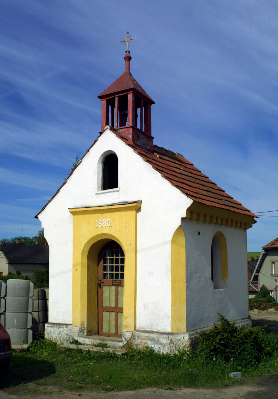 Kaplička z roku 1880 v Černíkovicích, kulturní památka.